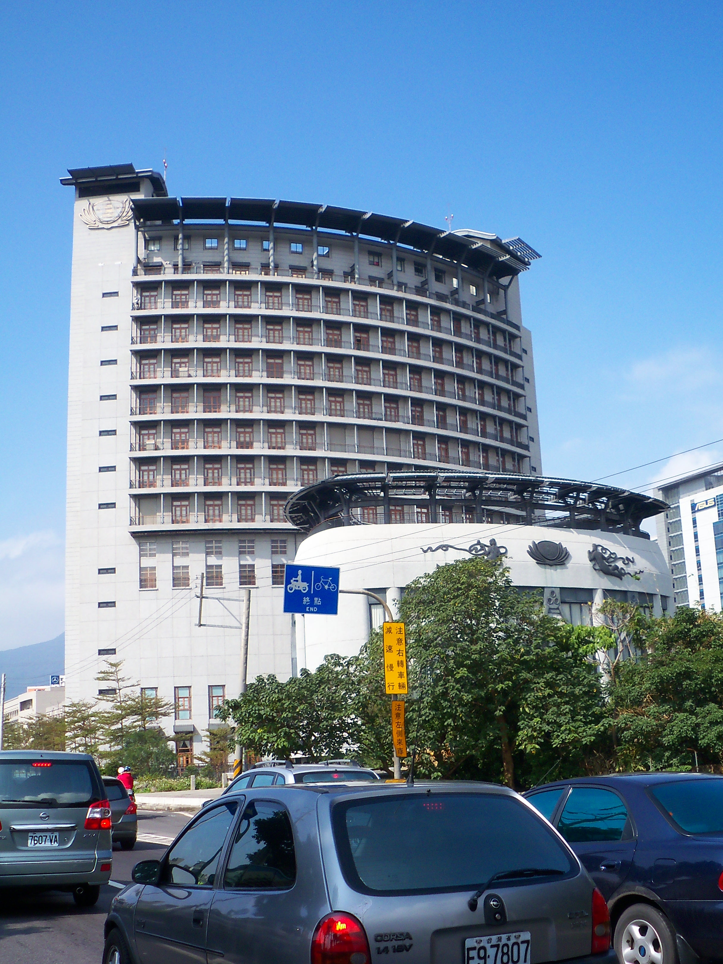 慈濟人文志業中心，地址：112 臺北市北投區立德路2號。